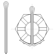 Zawleczka - schemat